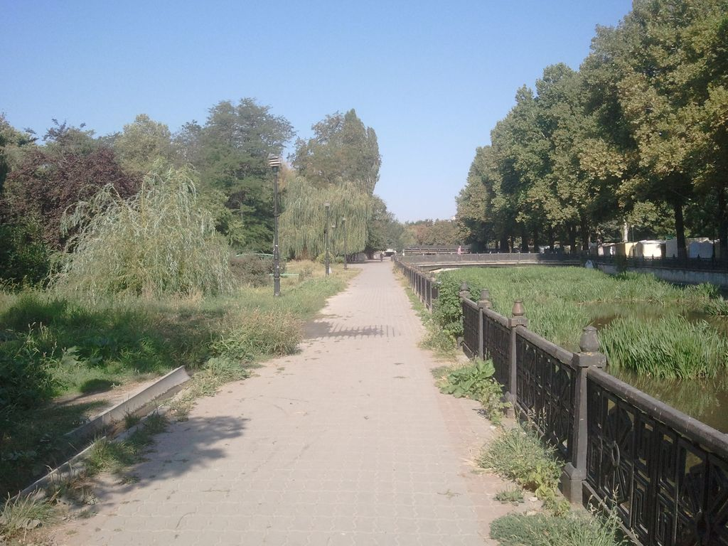 Аллея дружбы городов-побратимов. Центральная площадка парка "Екатерининский сад" в Симферополе. Набережная Салгира. 09/2018.